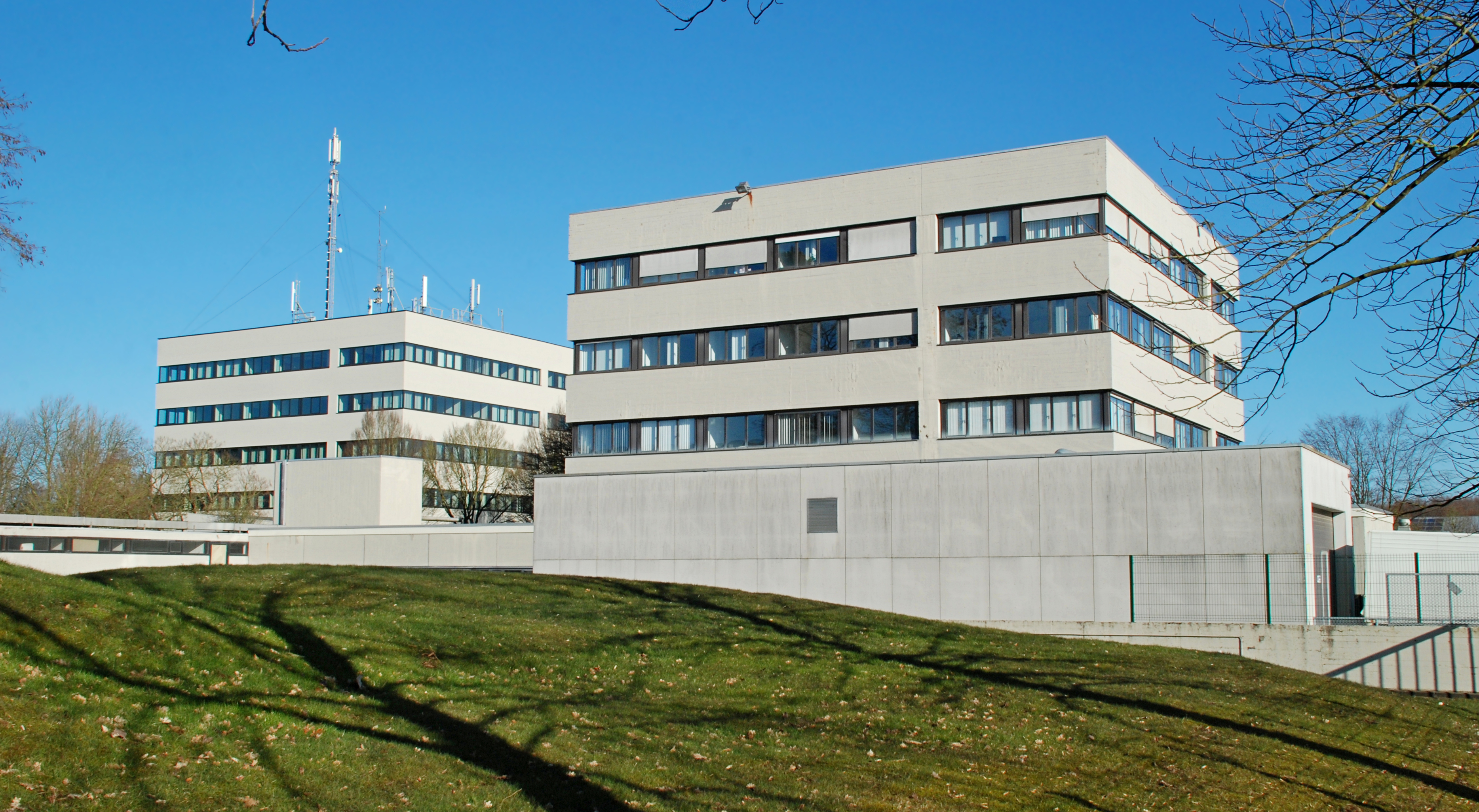 Belgique - Brabant wallon - Louvain-la-Neuve - Cyclotron (chemin du Cyclotron, architecture de style brutaliste, 1970-1972) : Tour est et tour nord This photo of immovable heritage has been taken in the Walloon Region